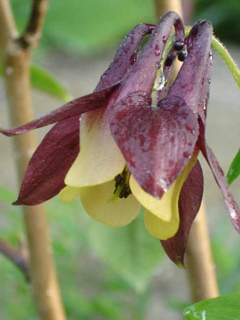 Aquilegia buergeriana